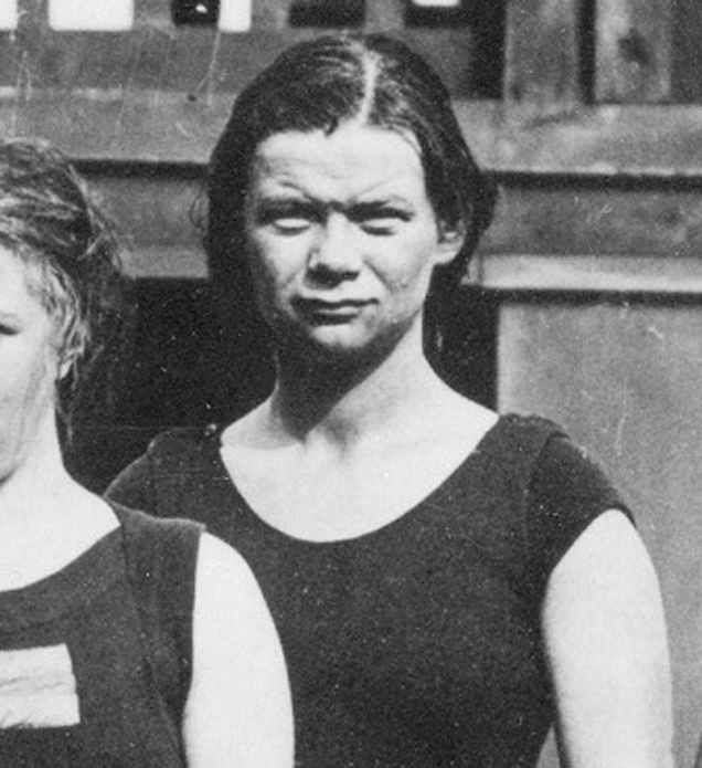 Viktoria Larsson